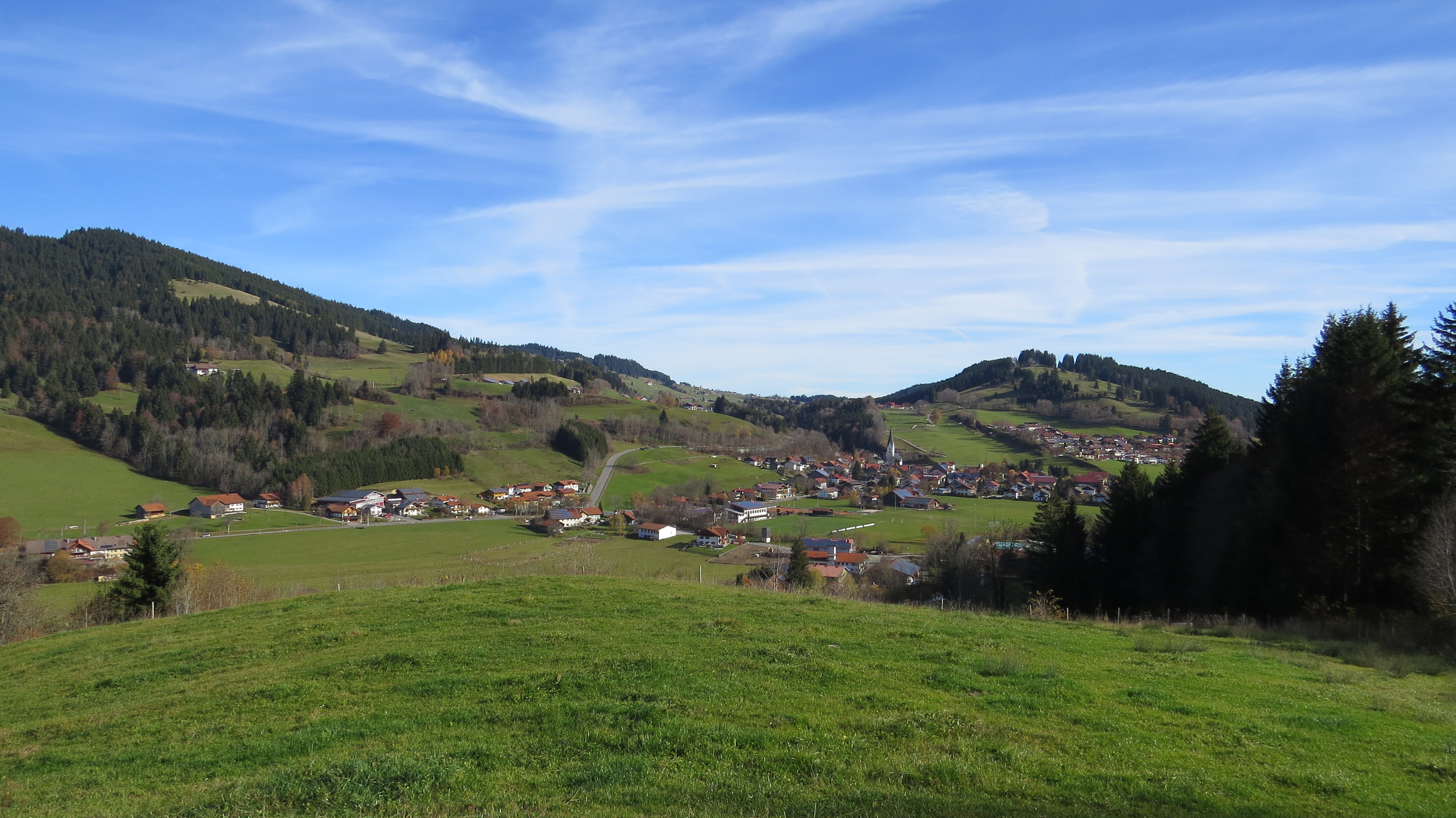 Missen von Westen, Missen-Wilhams; links der Hauchenberg